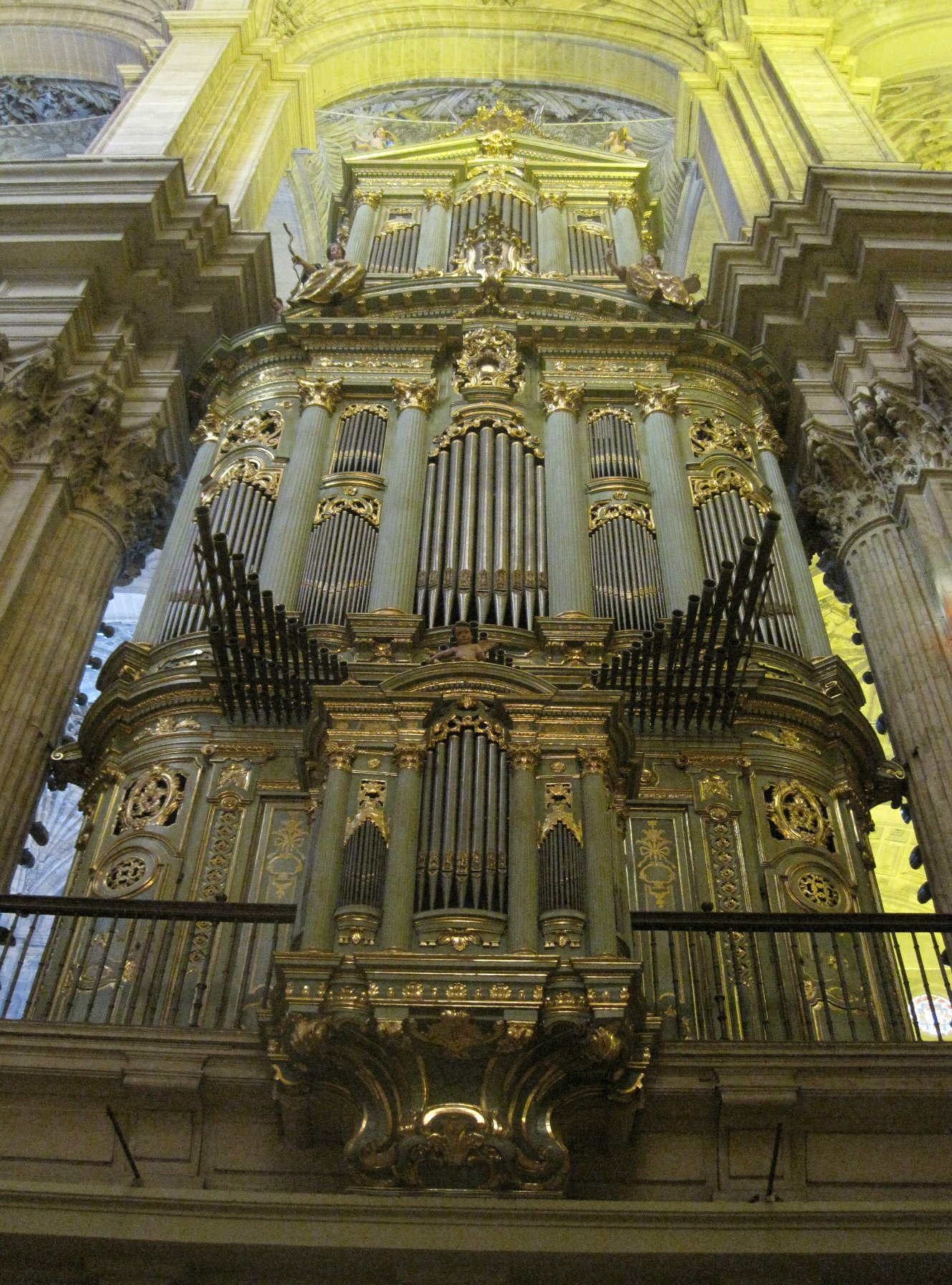 Epistelorgel der Kathedrale von Malaga (von aussen)